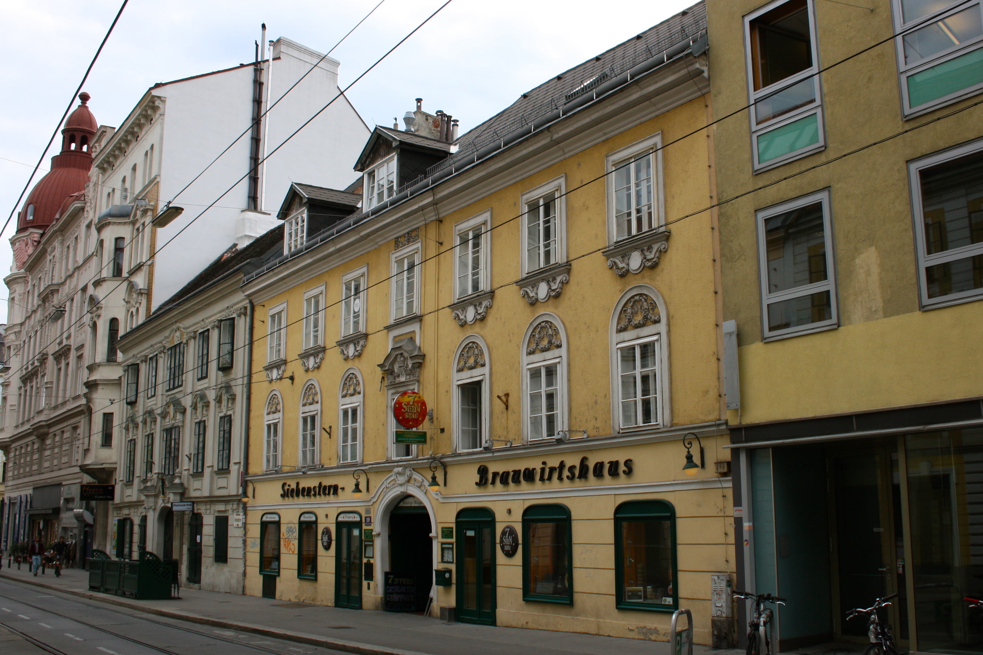 Bürgerhaus Zur goldenen Krone (Siebensternbräu, ehemals Restaurant Schöner). Siebensterngasse 19, Wien-Neubau.